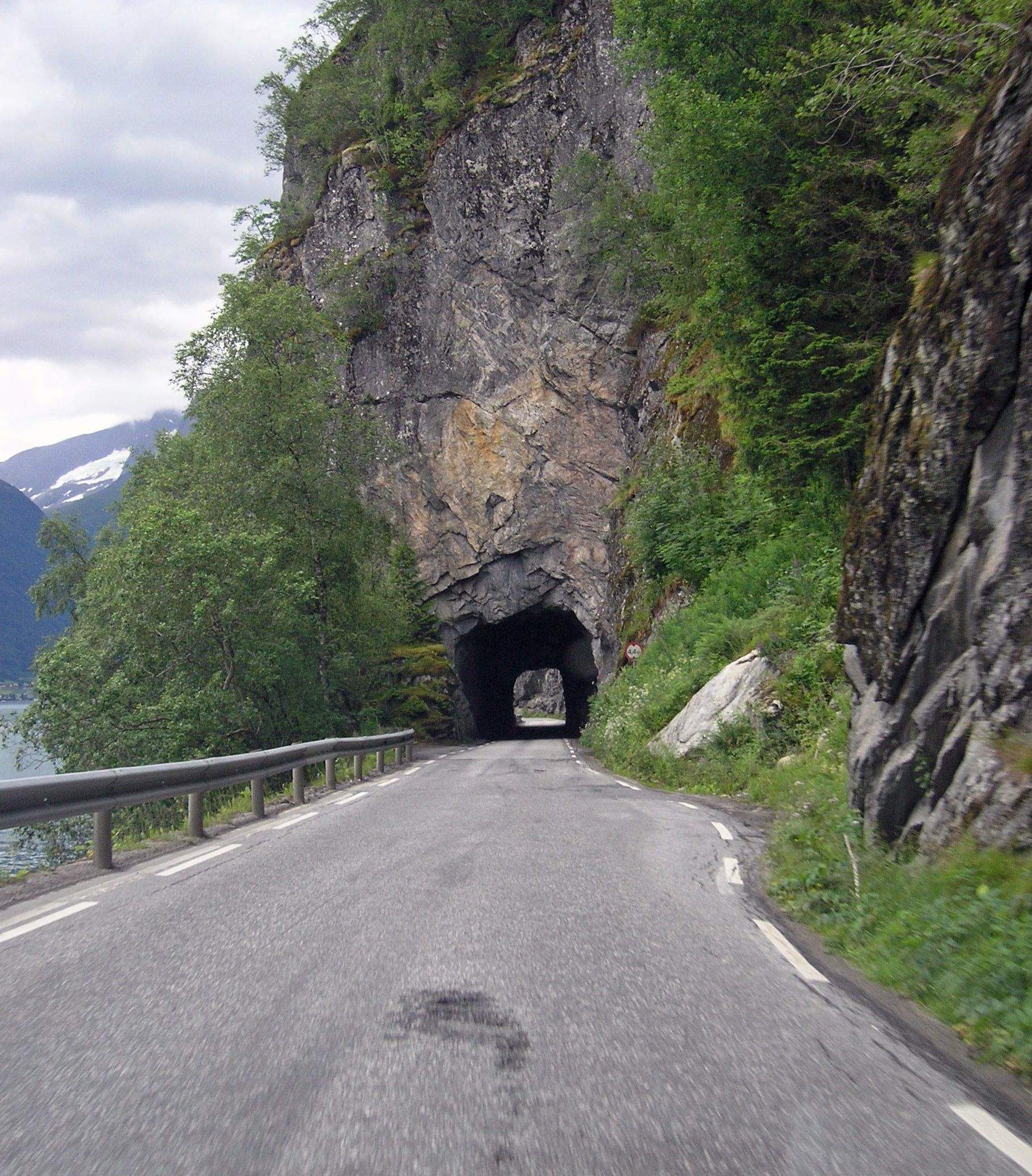 Reichsstrasse 60 am Nordfjord